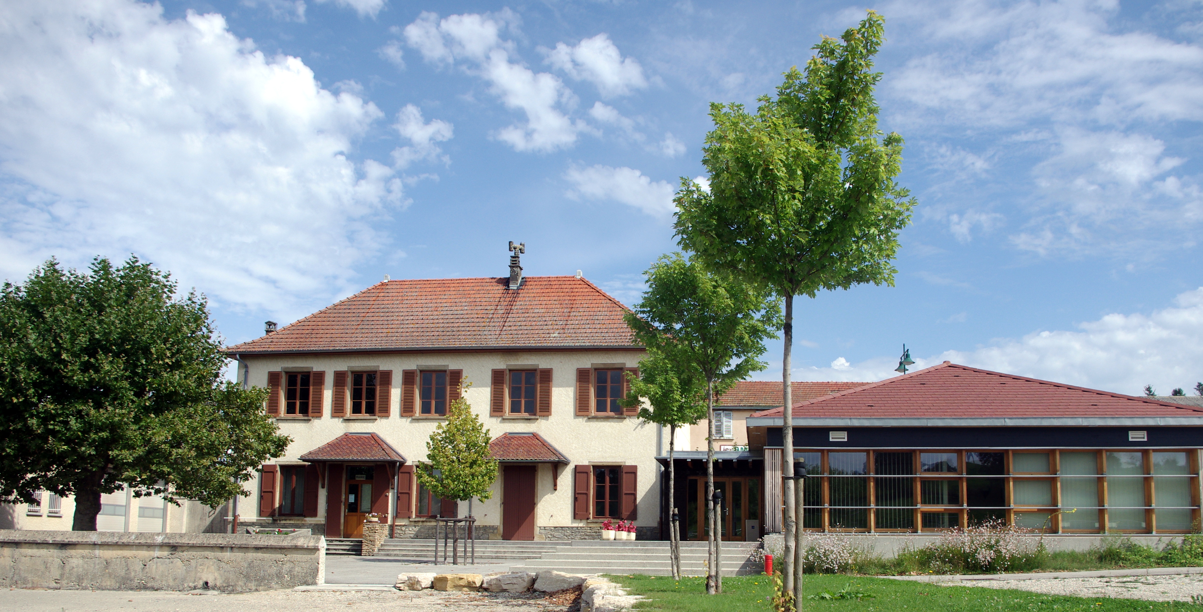 Mairie